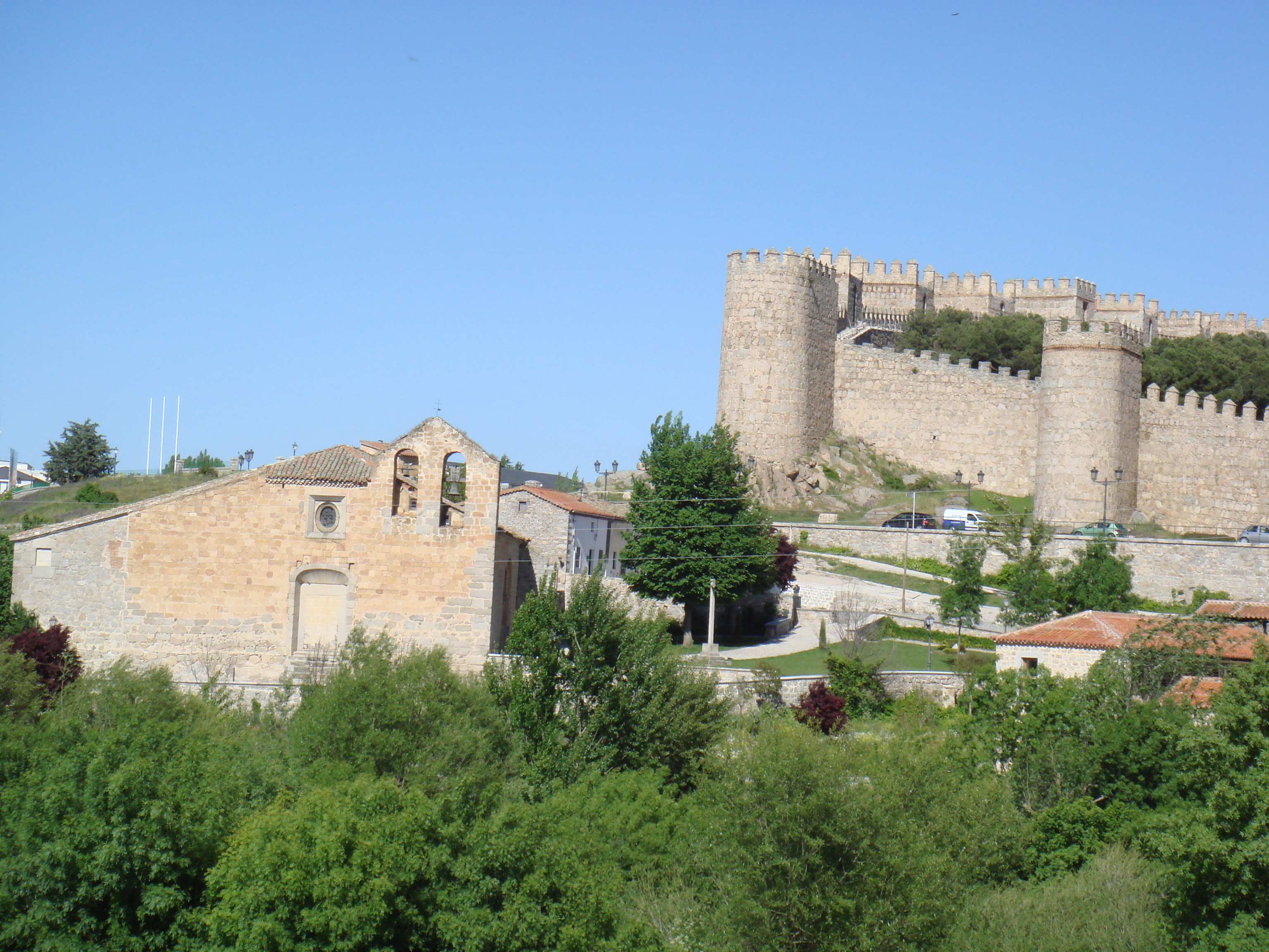 Iglesia de San Segundo y muralla de Ávila.